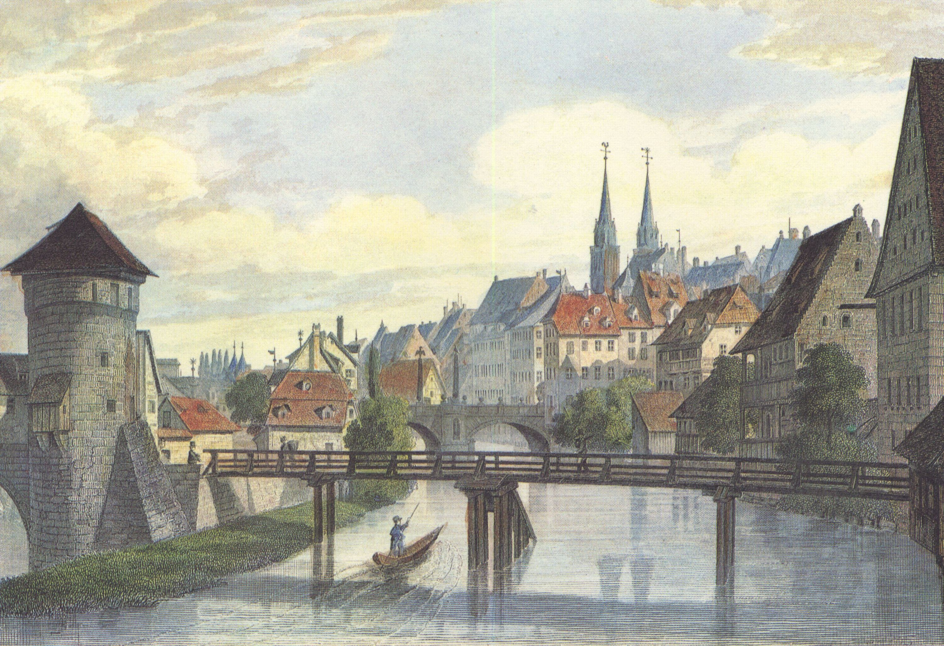 Nürnberg, Henkersteg und Karlsbrücke. Kolorierter Stahlstich.